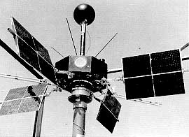 Explorer-18 (IMP-A) satellite